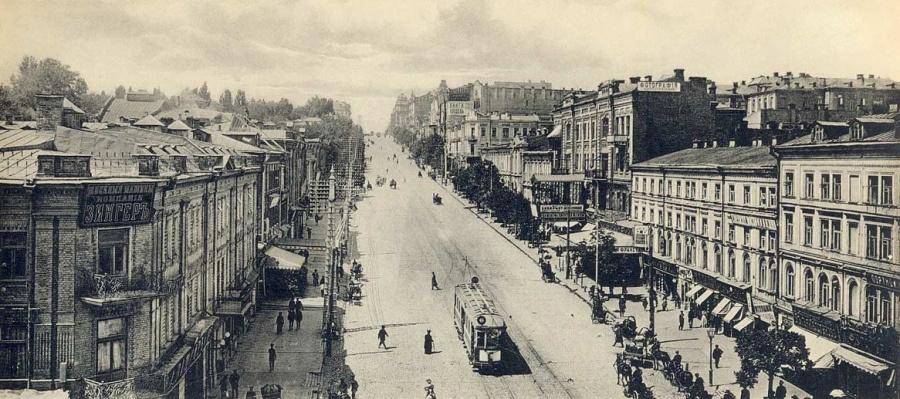 Вулиця Фундуклеївська, Київ: Вулиця Фундуклеївська, Київ (нині вул. Богдана Хмельницького)